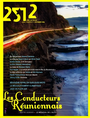 Couverture du numéro trois du magazine 2512.